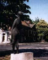 standbeeld Tineke van Heule in het centrum van Heule, foto genomen door mezelf